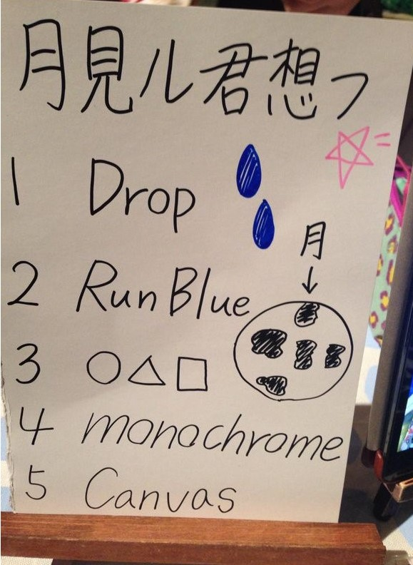 amiinaセトリボード(20150419(2))